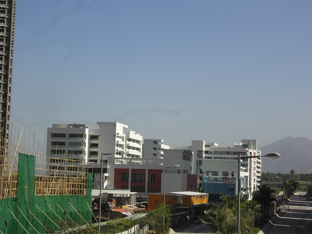 Pak Kau College